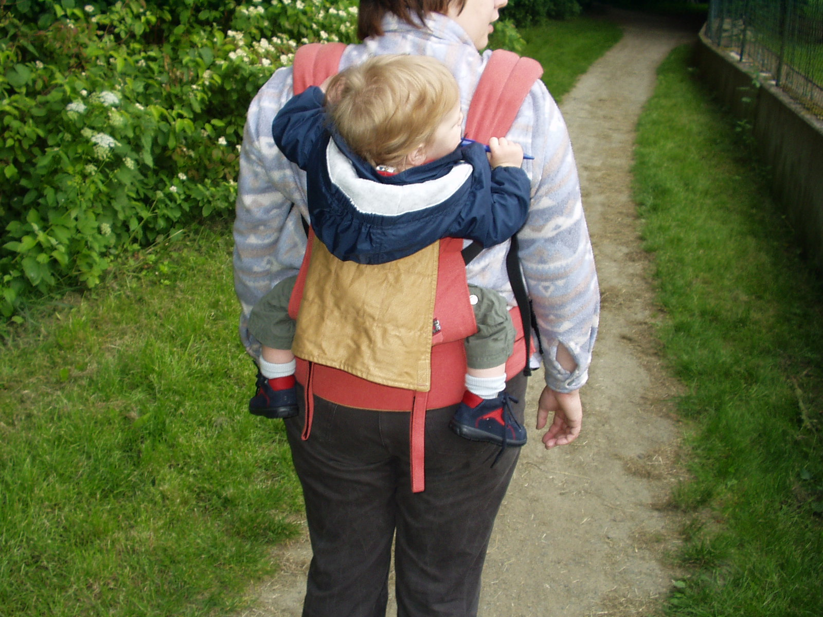 Ein Kind auf dem Rücken der Mutter in einem Babytragesack. Wichtig beim Tragen ist die gespreizte Beinhaltung des Kindes (Spreiz-Anhock-Haltung). Das Kind darf NIEMALS, egal welche Tragehilfe verwendet wird, mit dem Gesicht vom Körper des Tragenden weg in Tragehilfe gesetzt werden, auch wenn viele Hersteller das empfehlen.}